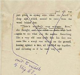 1974年に発見された、「かつらを被った雀蜂」の挿話を含む『鏡の国のアリス』の校正ゲラ刷り。